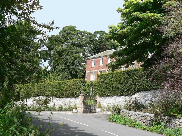 Parwich Hall